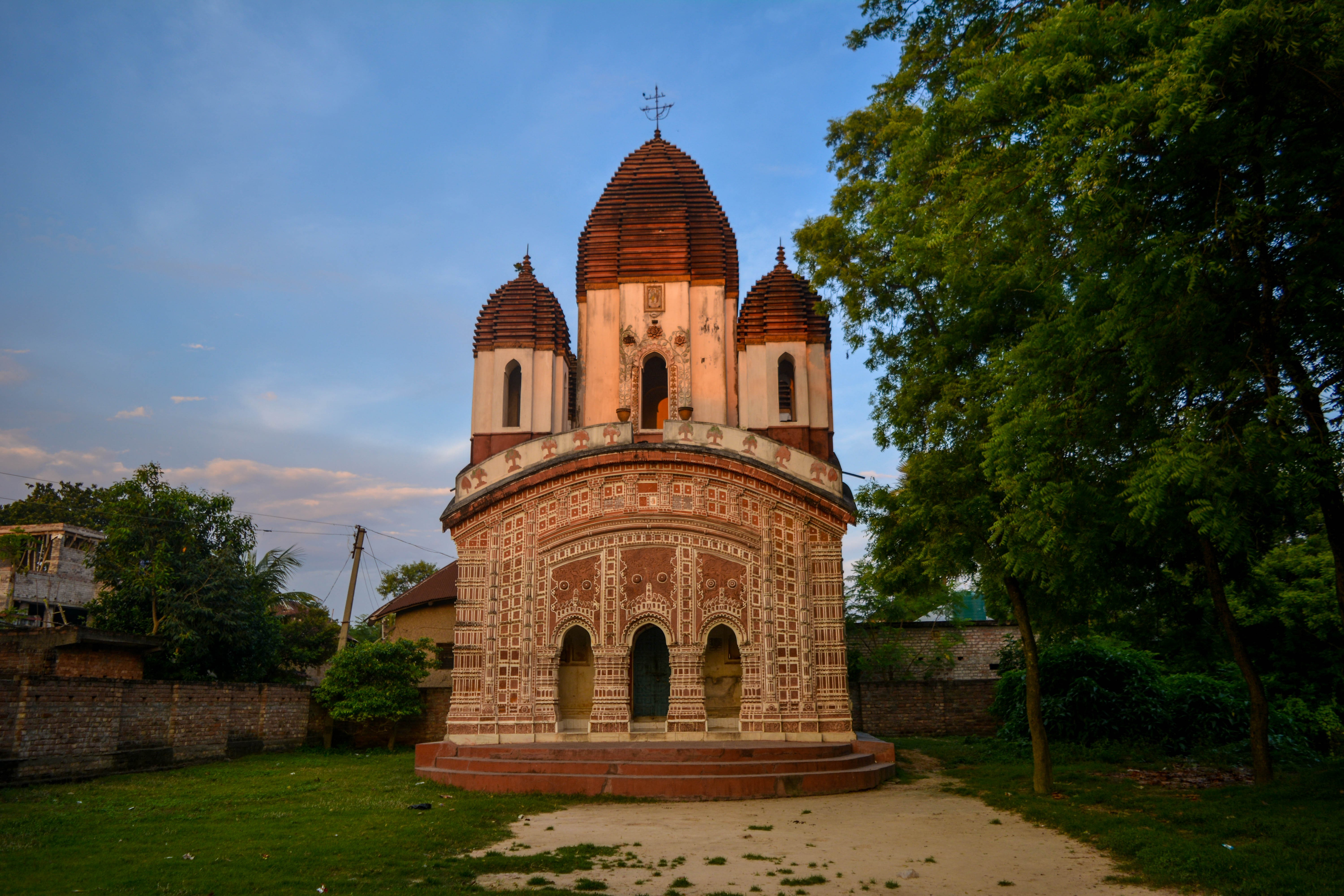 বৃন্দাবনচন্দ্র মন্দির